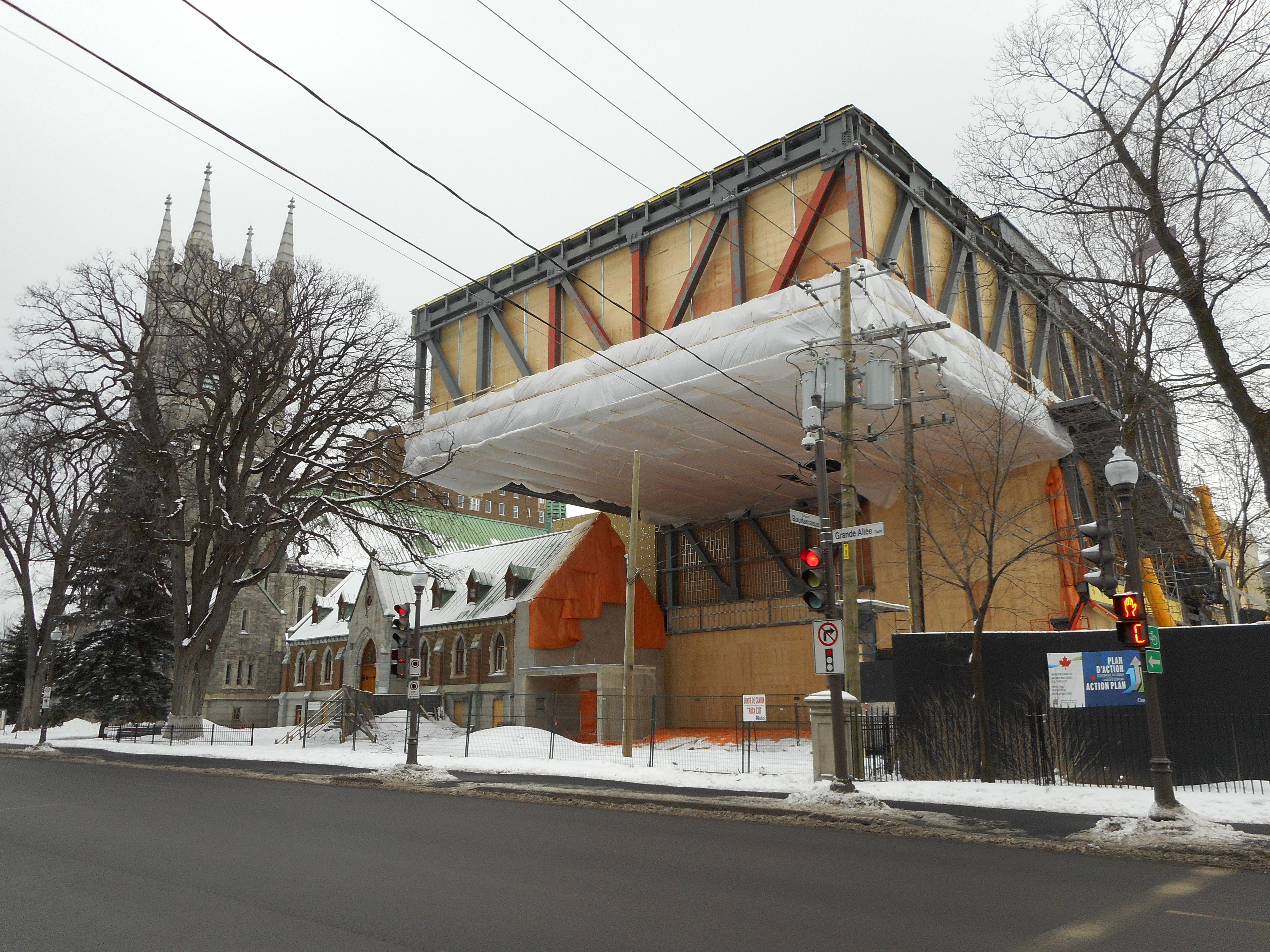 Église Saint-Dominique, 175, Grande Allée Ouest, Québec Agrandissement du Musée national des beaux-arts du Québec